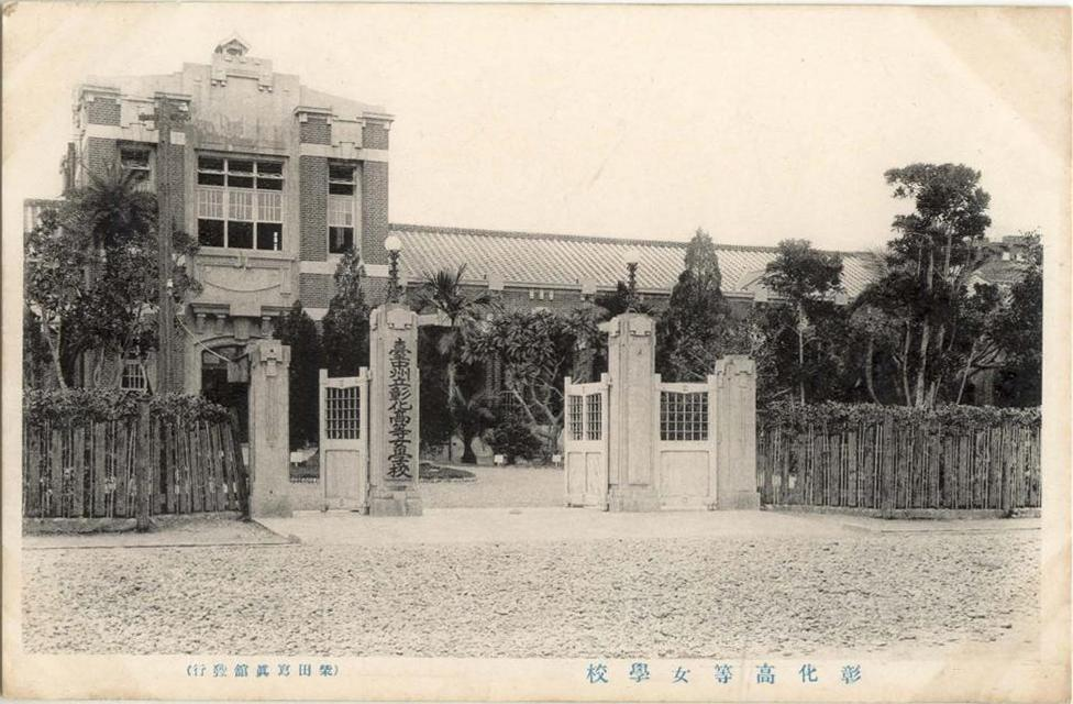 臺中州立彰化高等女學校，今國立彰化女子高級中學